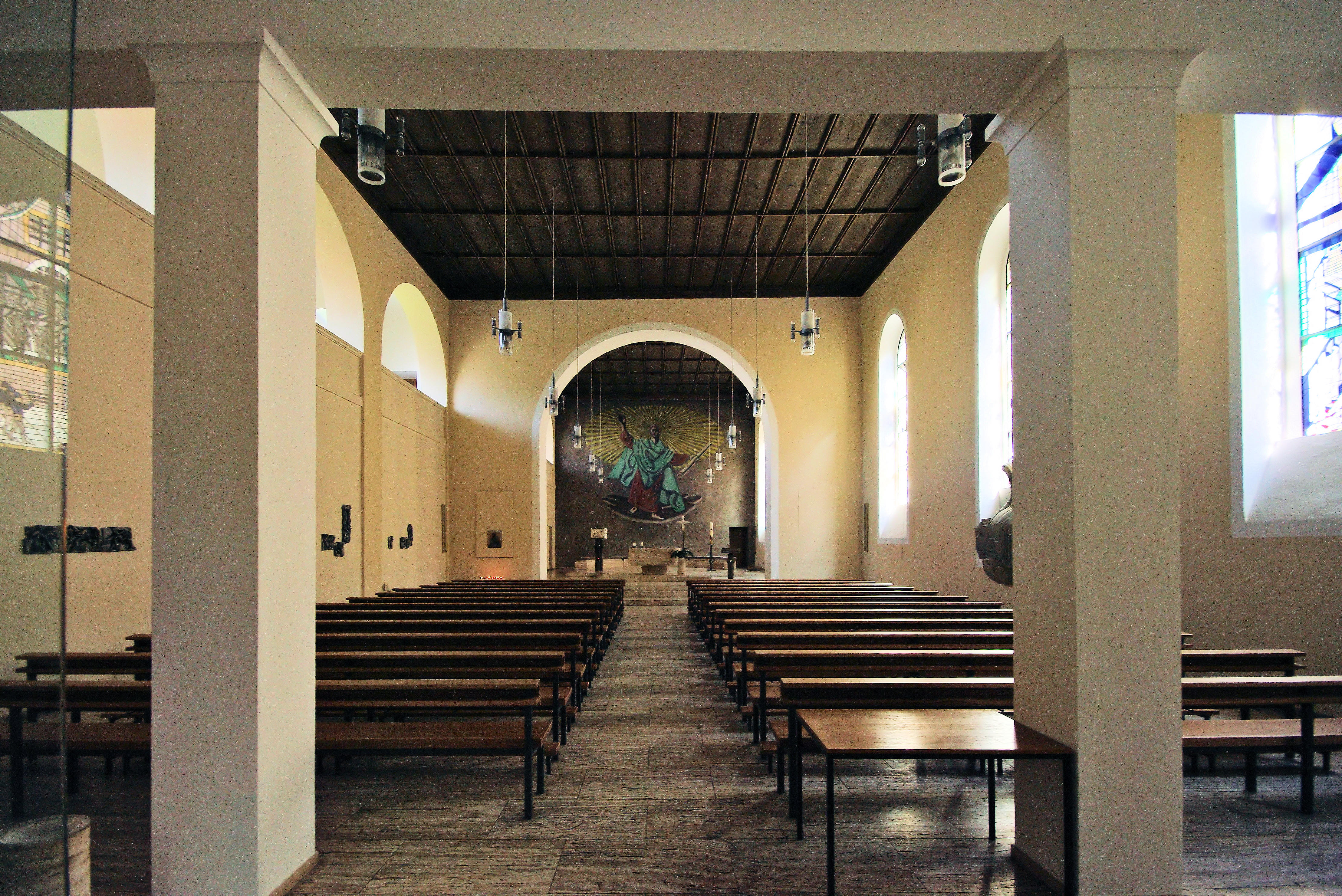 Der Innenraum der Konviktkirche in Freiburg mit Wandbild von Richard Seewald (wiederkehrender Christus mit Schriftrolle in richtender Geste).